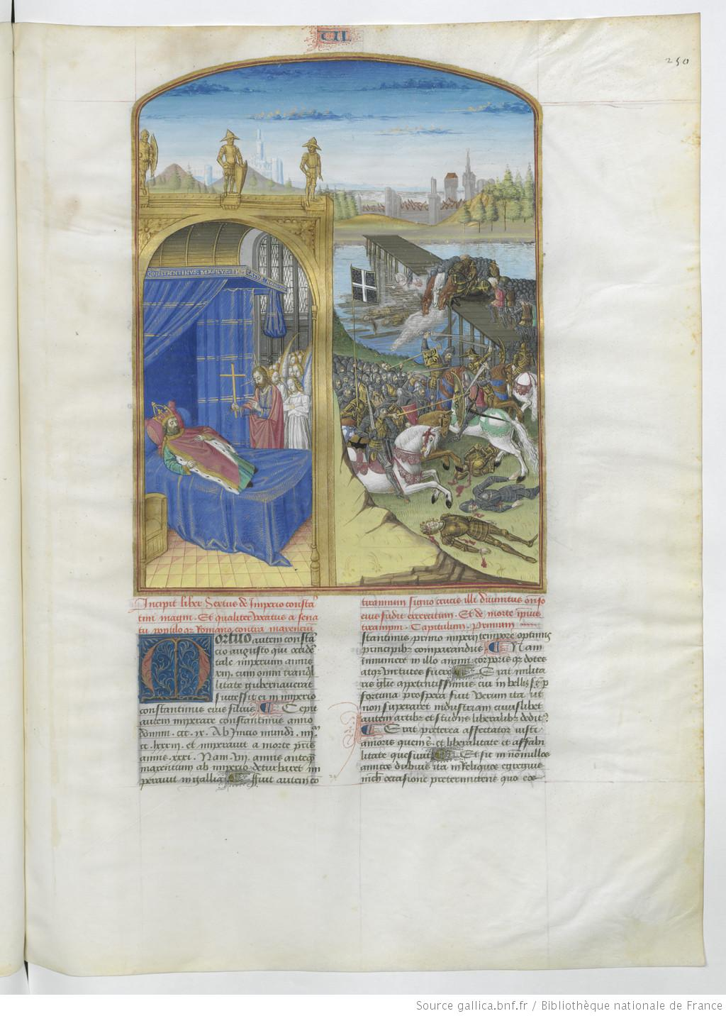 Mare Historiarum - BNF Lat4915 Fol. 250r. Songe de Constantin lui prédisant la victoire sur Maxence au pont Milvius.